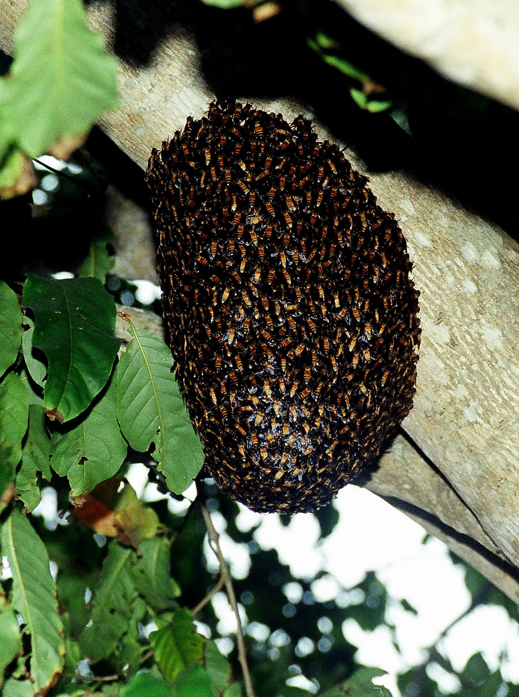 Beehive on a tree branch in the Sunderban, 2008